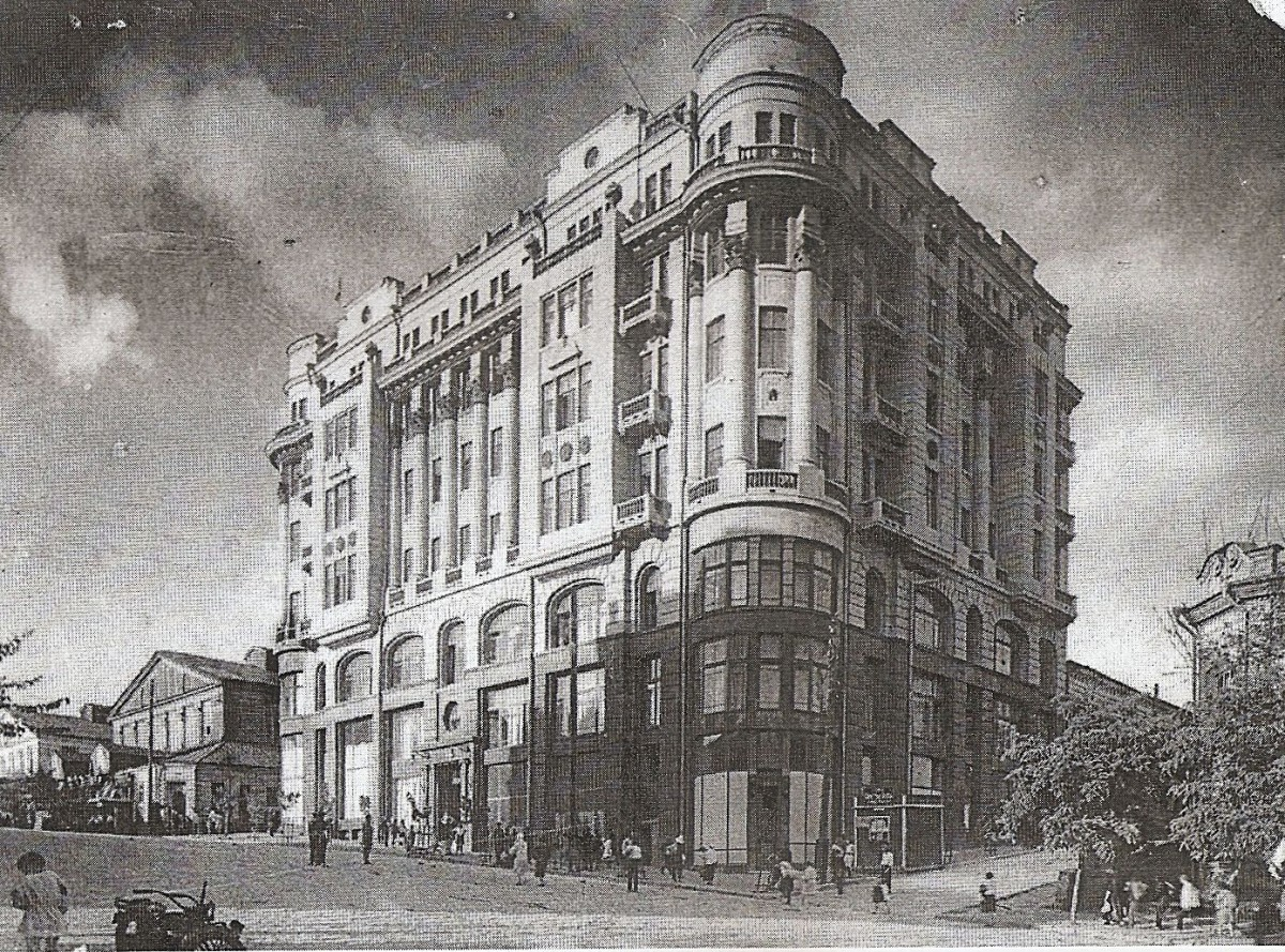 Ростов-на-Дону Гостиница Дон, 1930г. .